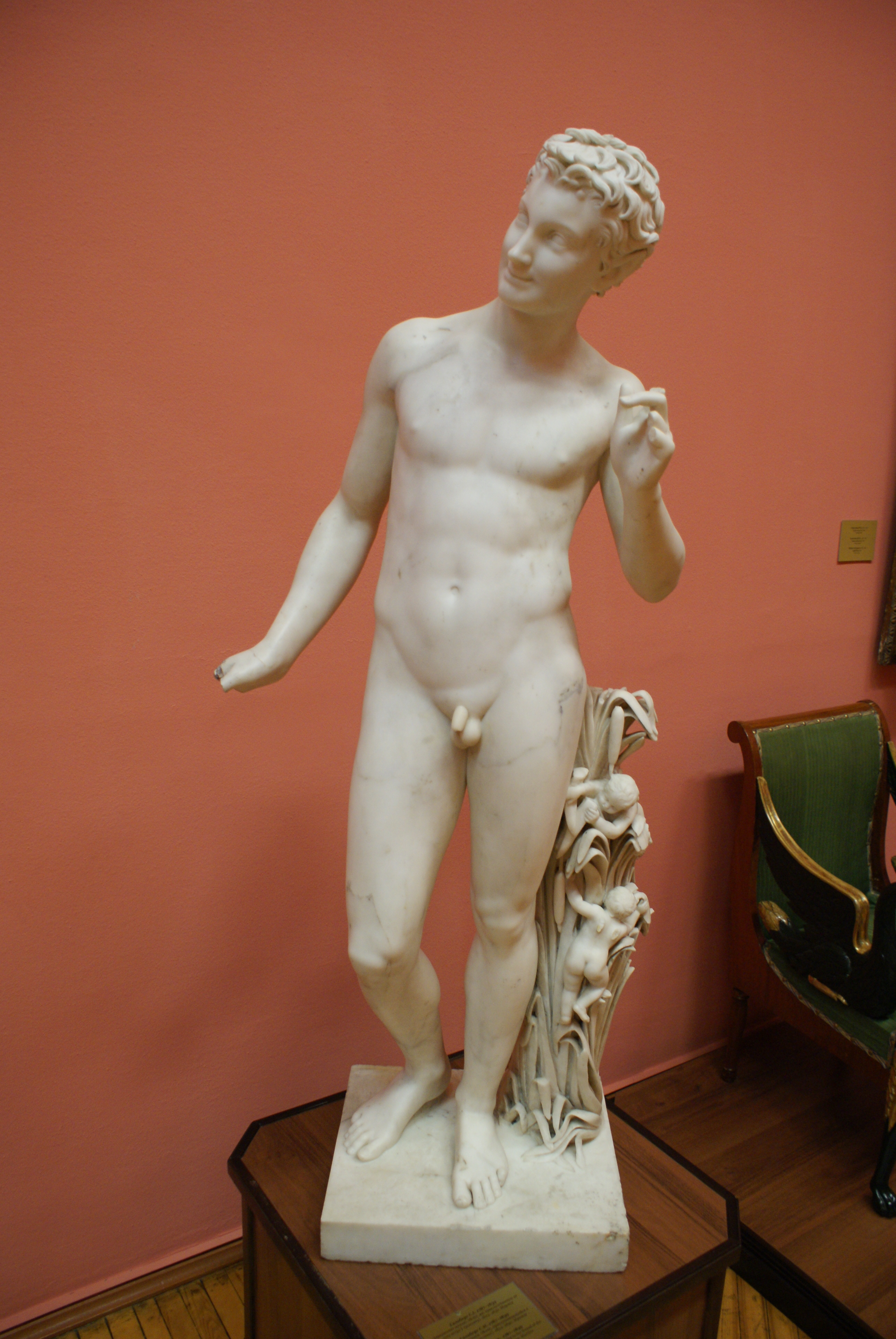 Гальберг С. І. Зараджэнне музыкі (фаўн, які прыслухоўваецца да гуку ветра ў трыснягу). Мармур